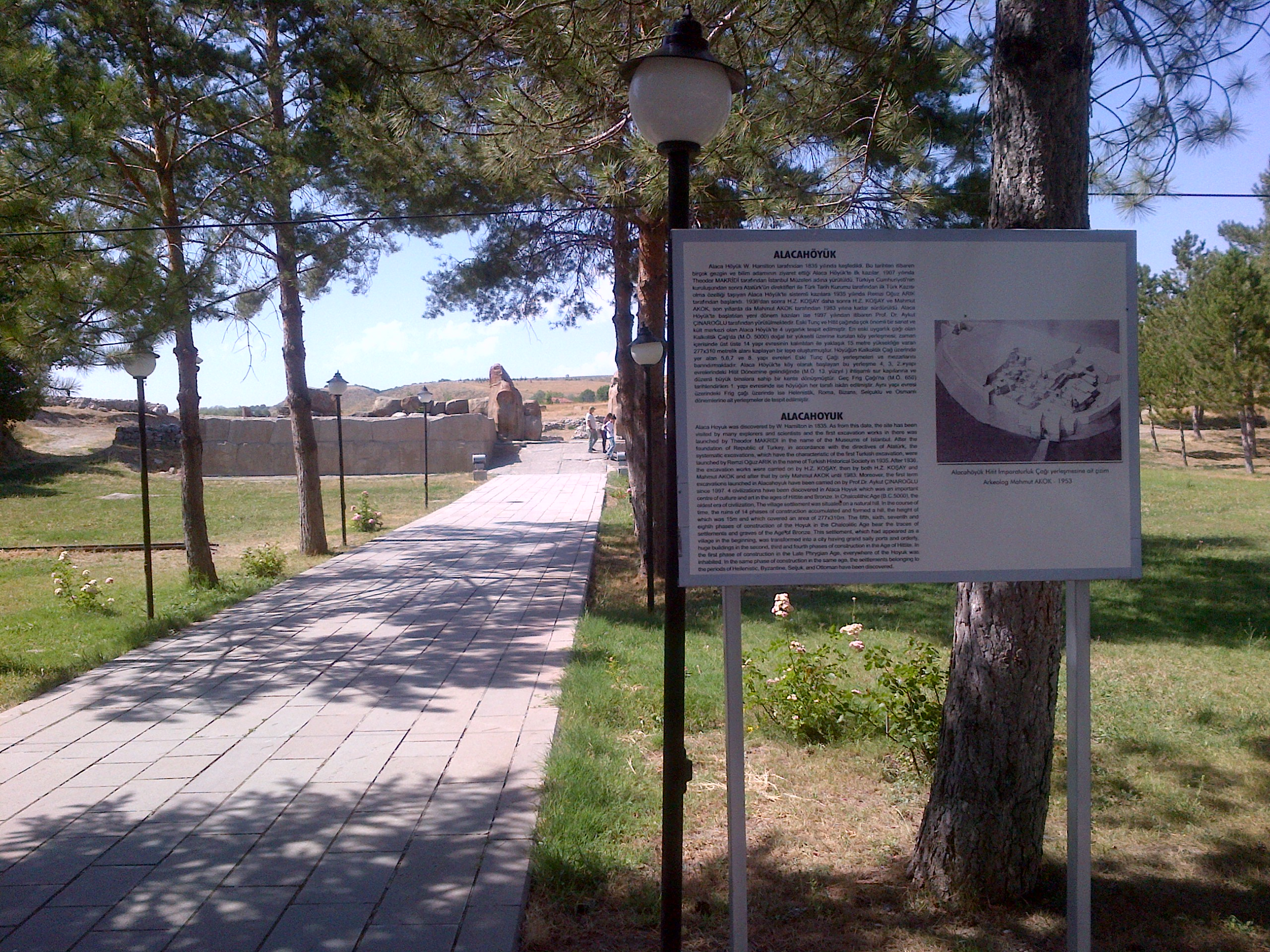 Entrada a las ruinas hititas de Alacahöyük en Turquia.